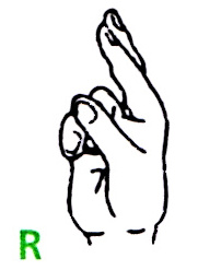 Der Buchstabe R im deutschen Fingeralphabet, entsprechend einer Infokarte des Landesverbandes Bayern der Gehörlosen e.V. (